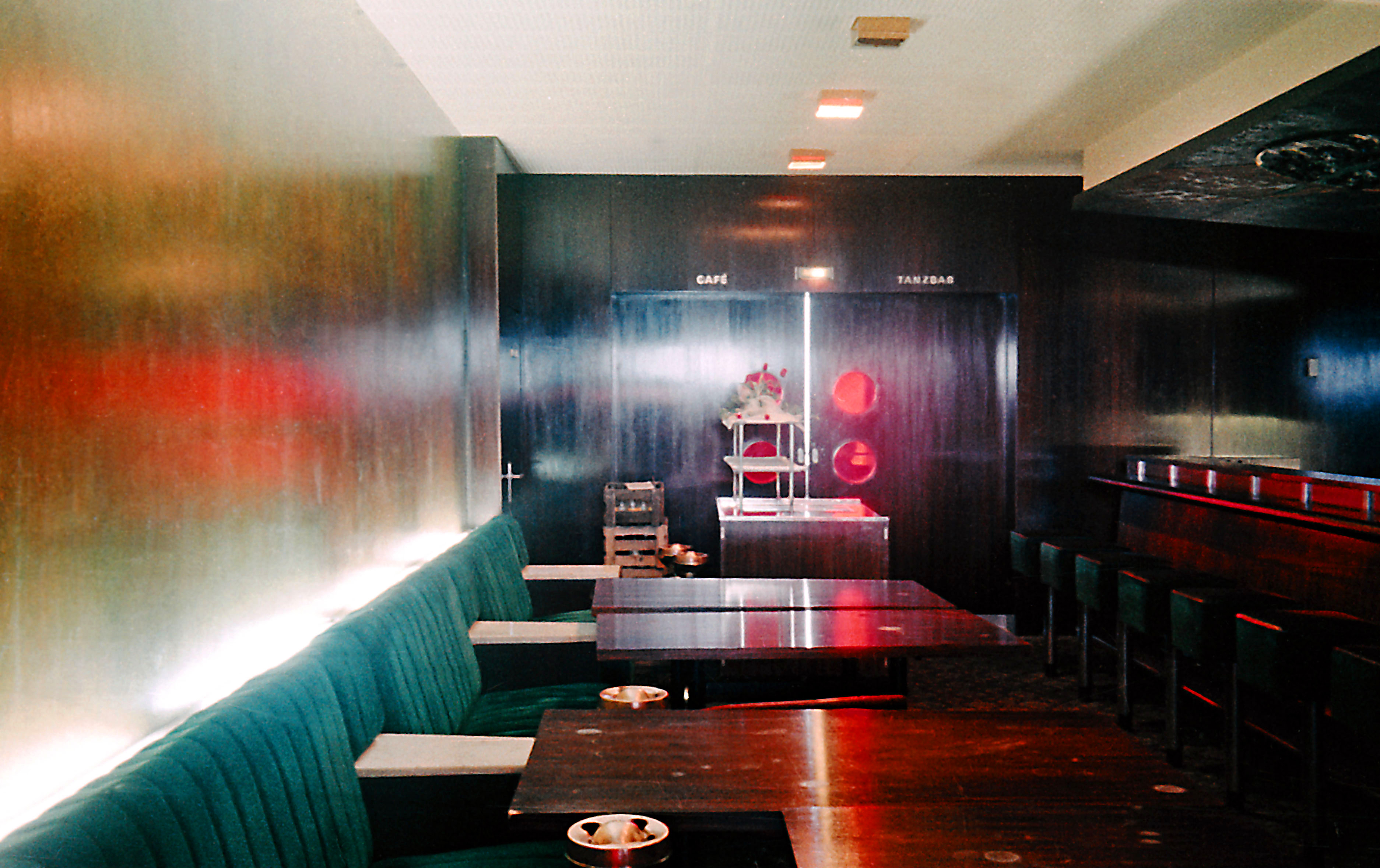 18.04.1972 DDR 1000 [10178] Berlin-Mitte, Alexanderplatz: Interhotel Stadt Berlin (GMP: 52.522808,13.412738). Das Hotel wurde von 1967 bis 1970 nach Entwürfen von Roland Korn, Heinz Scharlipp und Hans Erich Bogatzky erbaut. Im Dezember 2006 erwarb die US-amerikanische Blackstone Group die Hotel Stadt Berlin Grundstücks GmbH. Der neue Name lautet Park Inn by Radisson Berlin Alexanderplatz. Hier ein Blick in die Nachtbar im Dachgeschoß im Jahr 1972. [F19720317A]19720418450NR.JPG(c)Blobelt